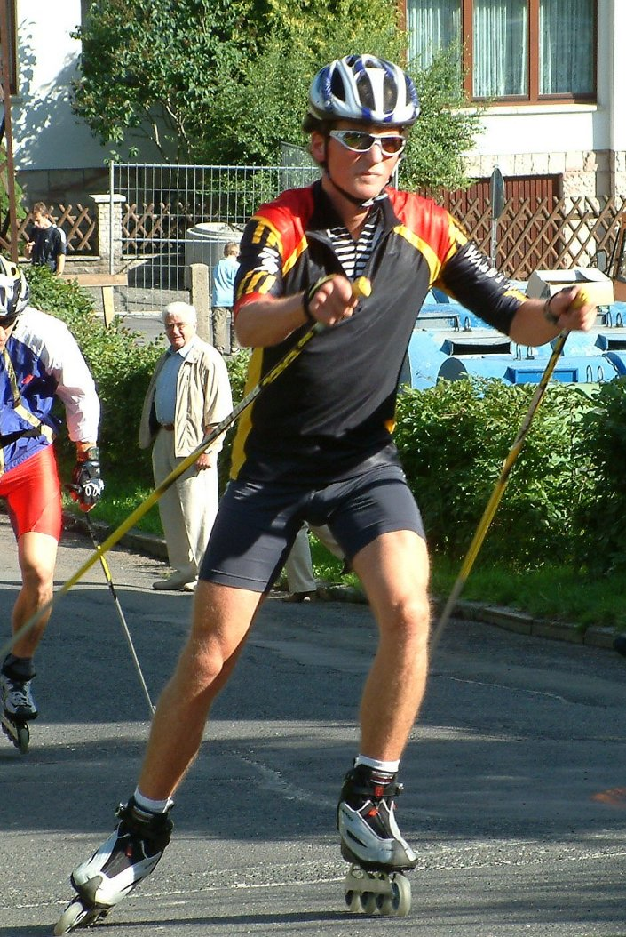 Georg Hettich during the Sommer Gand Prix in Steinbach-Hallenberg